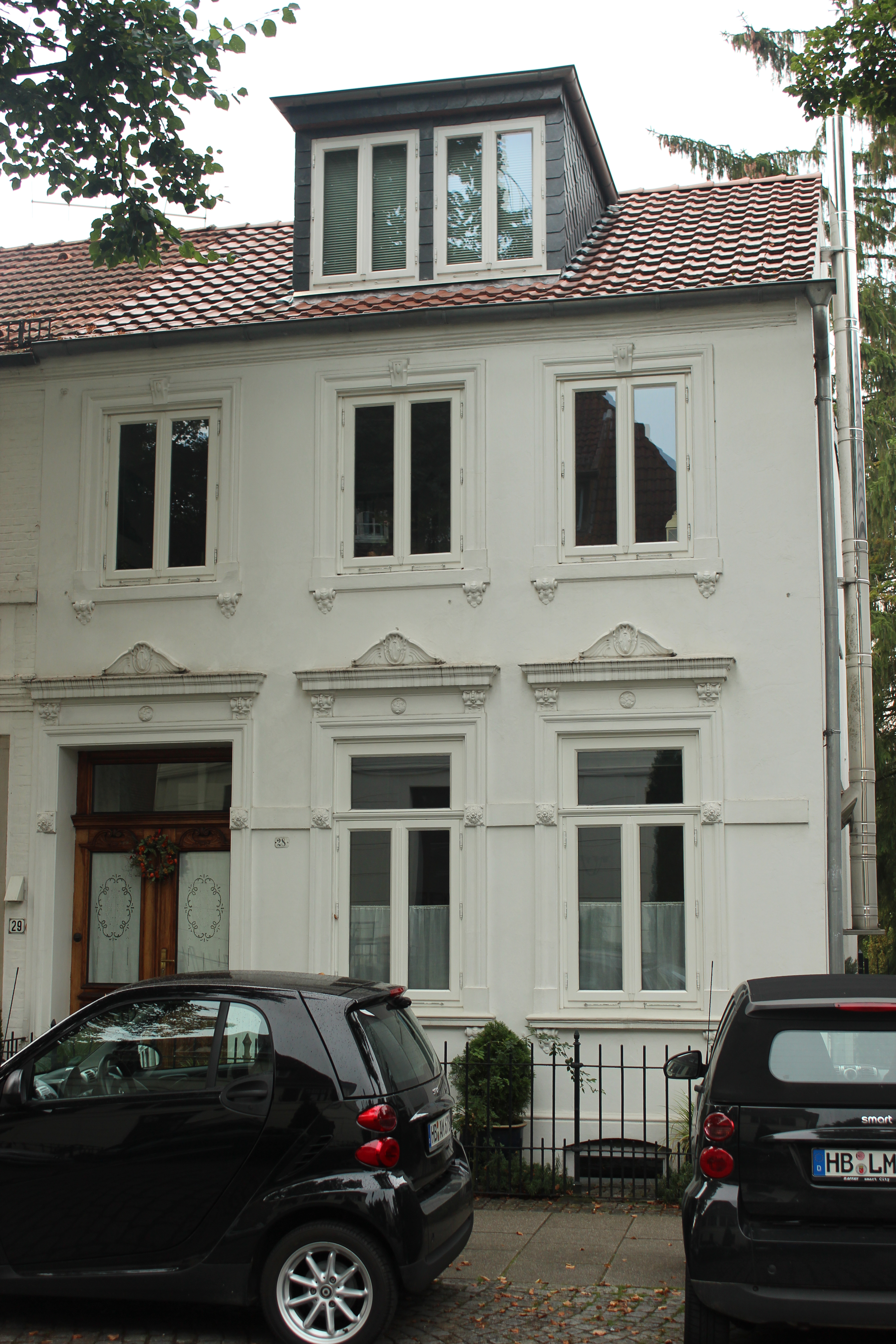 Wohnhaus in Bremen, Weserstraße 28.Das abgebildete Objekt ist ein geschütztes Kulturdenkmal in der Freien Hansestadt Bremen, mit der Nr. 1328 beim Landesamt für Denkmalpflege registriert.